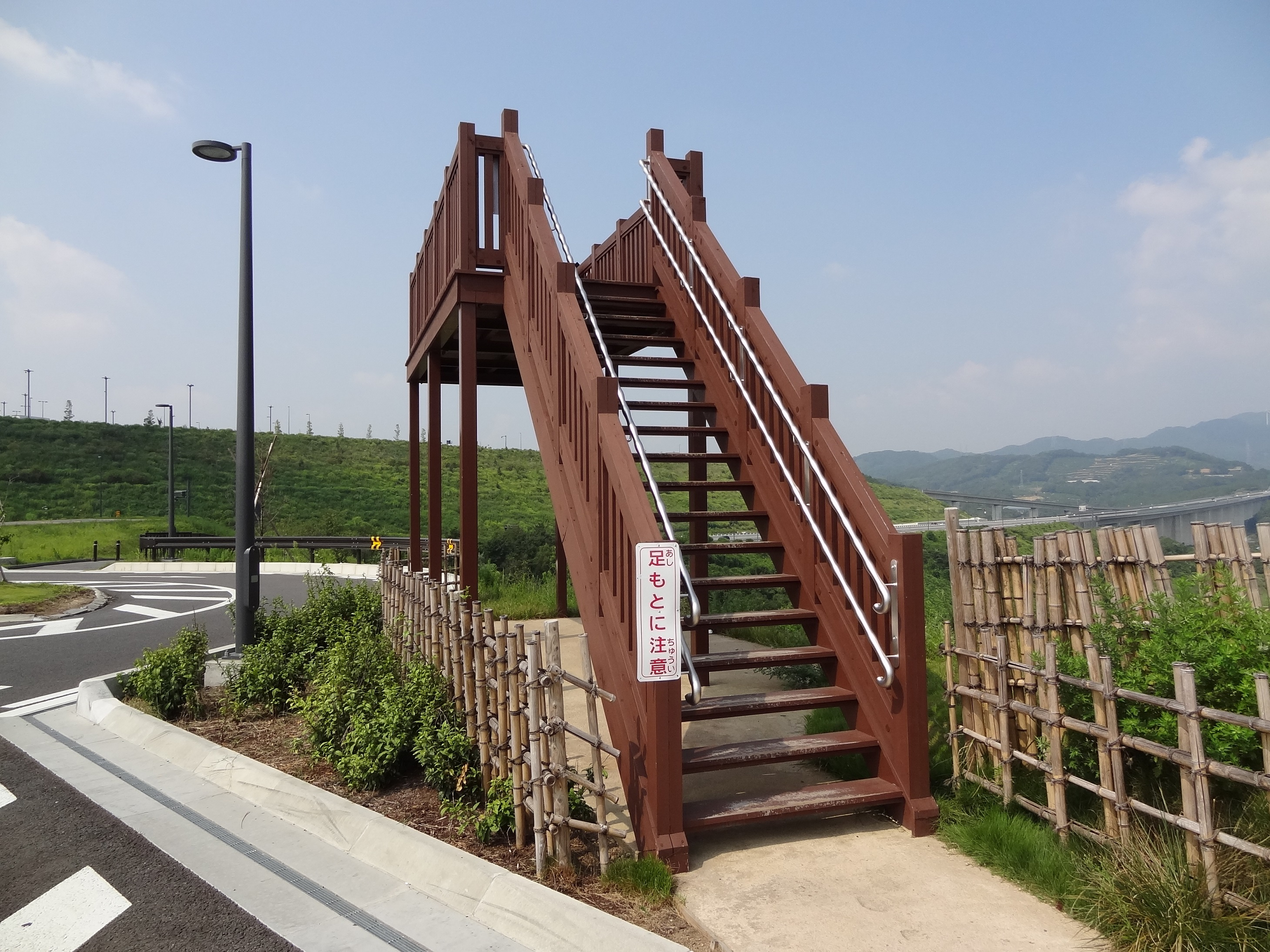 浜松サービスエリア上り